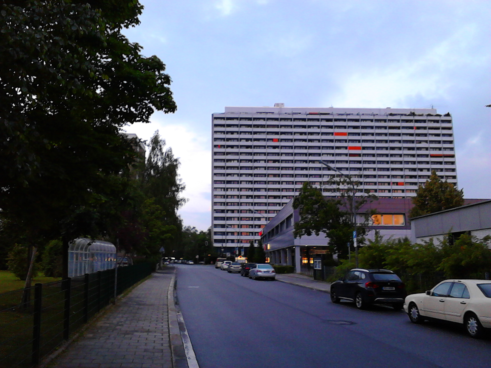 Das DEBA-Hochhaus in der Parkstadt Solln, München, Sicht von Osten, von der Gulbranssonstraße aus. Davor das Ärzte- und Einkaufszentrum Parkstadt Solln